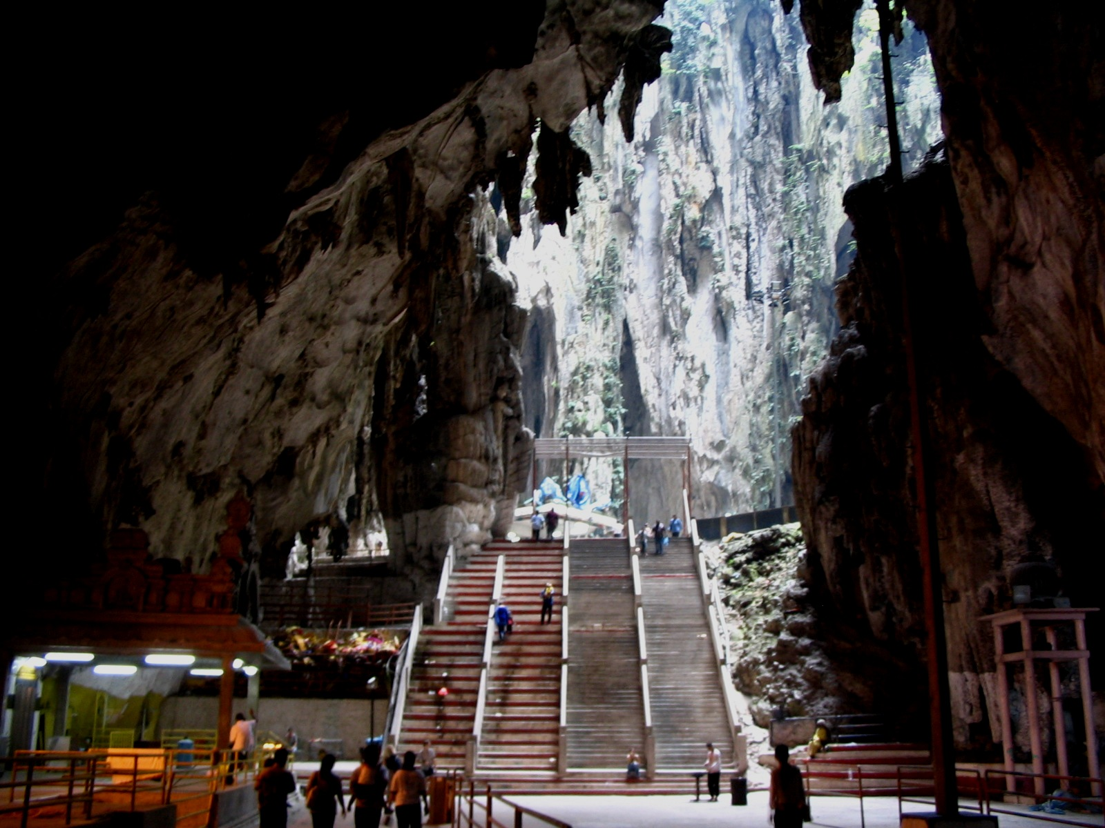 Batu caves - Intérieur de la grotte principale - Kuala Lumpur - Malaisie